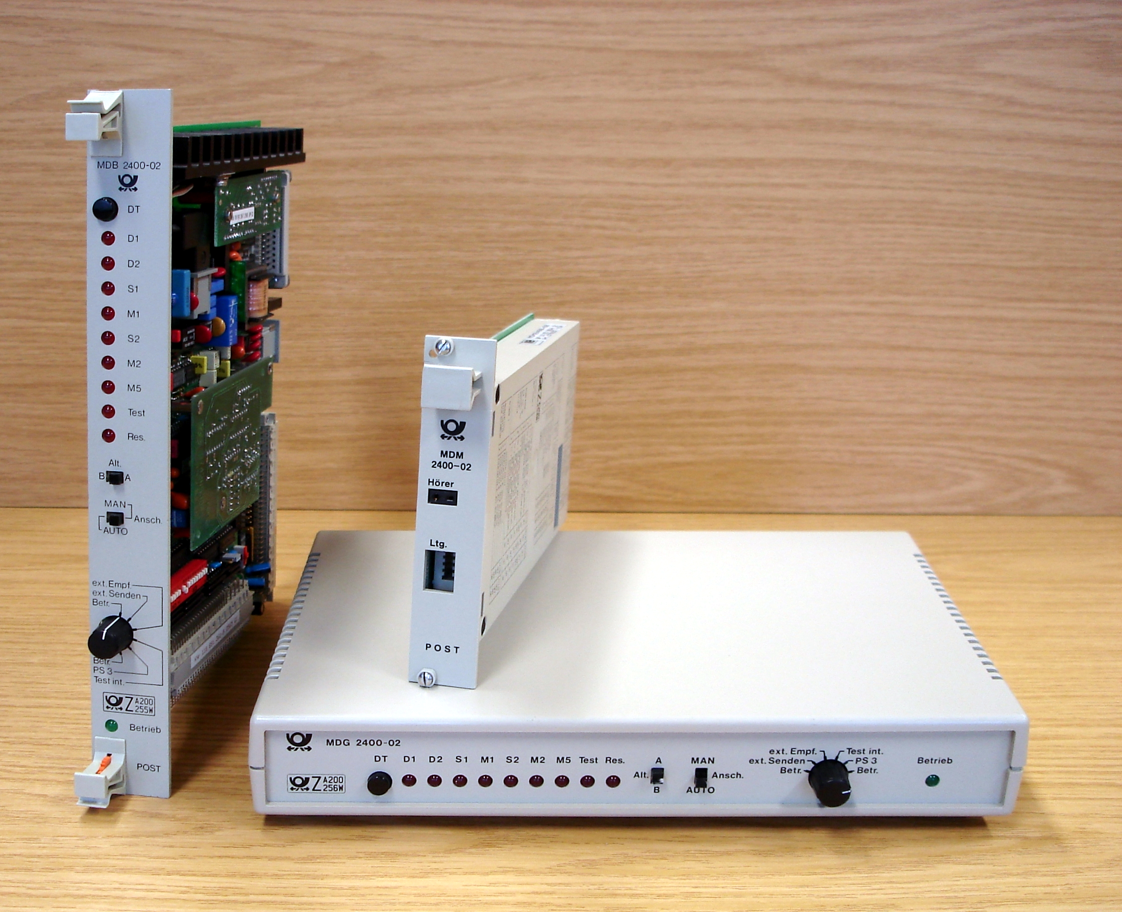 Verschiedene Bauformen des gleichen Modems (Hersteller: ke kabelmetal elektro): MDG: Modemgerät, externes Tischgerät (Steckernetzteil aus optischen Gründen entfernt) MDB: Modembaugruppe, das gleiche Gerät als Einschub für 19Zoll-Einbaurahmen, MDM: Modemmodul, für den direkten Einbau in Datenendeinrichtungen. Das Modul ist das eigentliche Modem, es ist sowohl im Gerät als auch in der Baugruppe vorhanden. Alter dieser Modems: ca. 17 Jahre